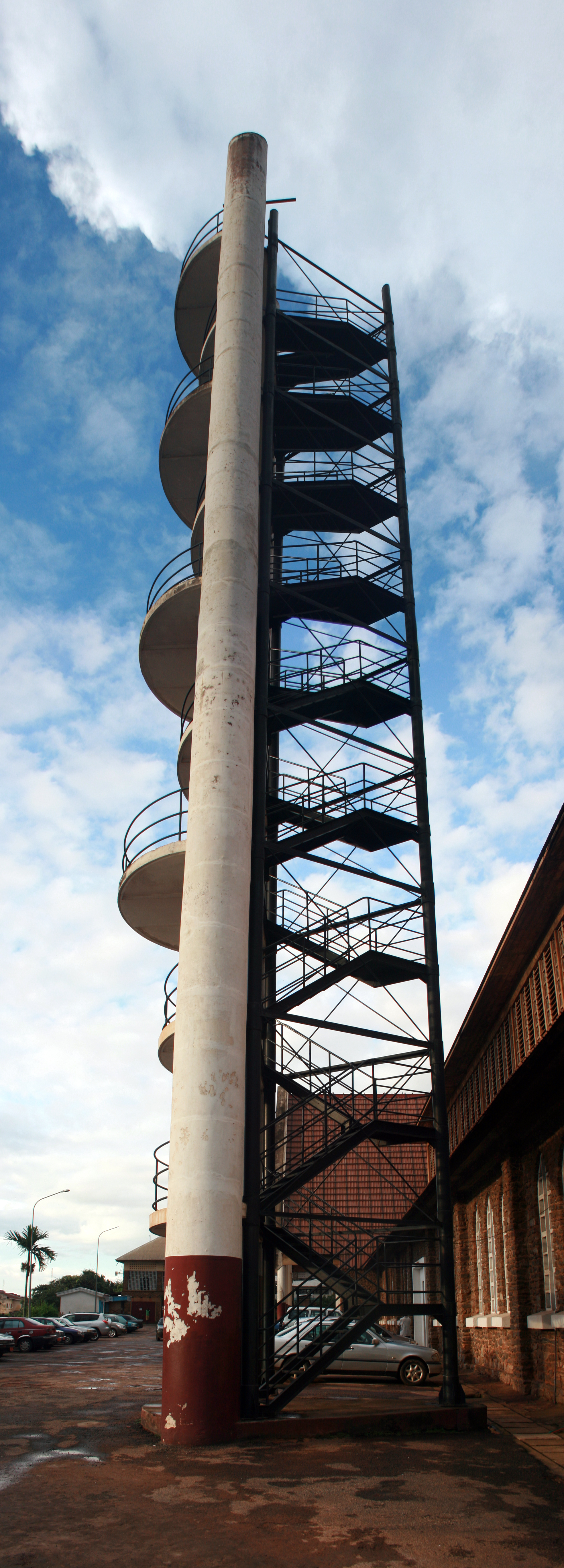 Cathédrale Notre Dame de Victoire de Yaoundé